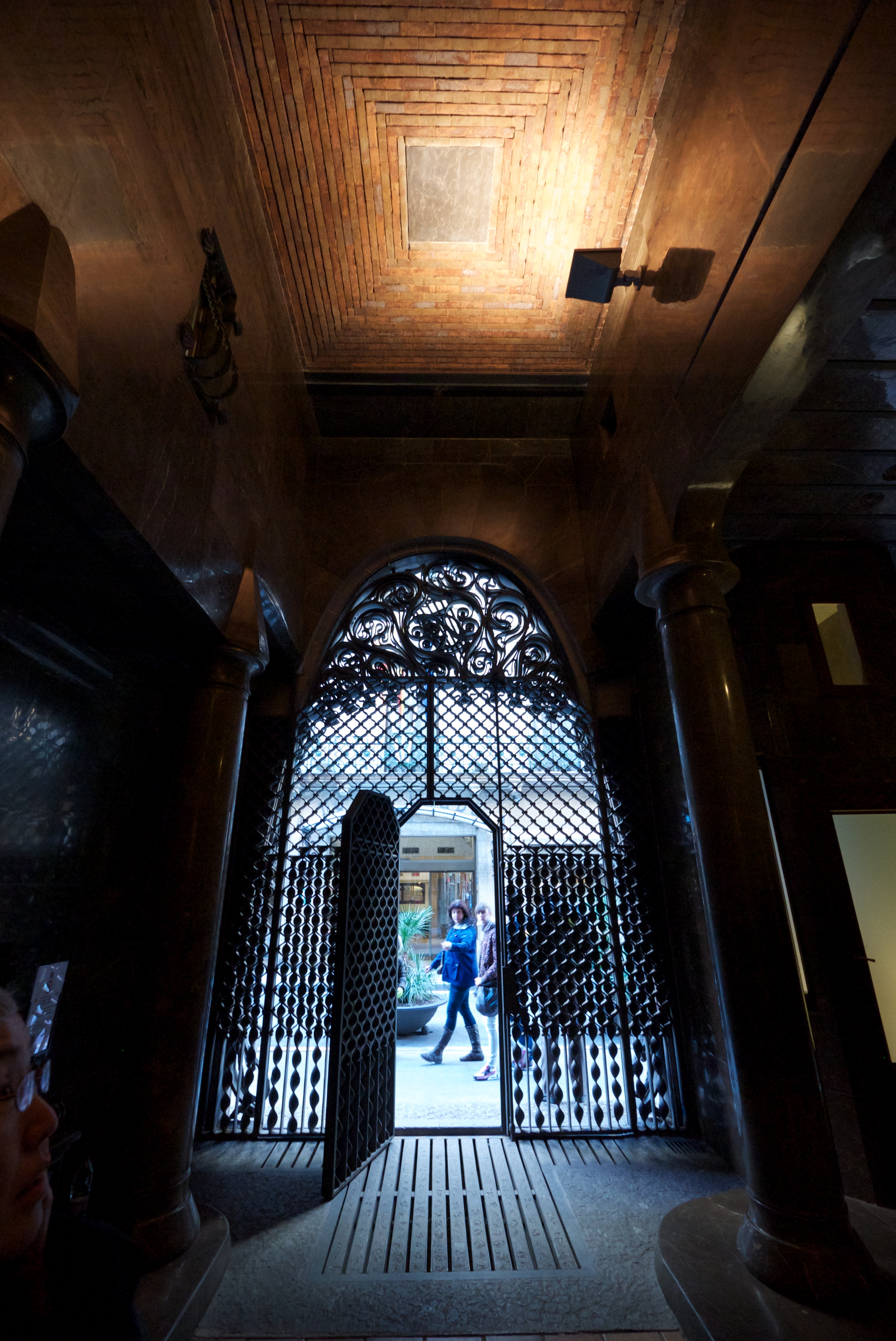 Entrada principal del Palau Güell d'Antoni Gaudí a Barcelona, Catalunya. 1888.